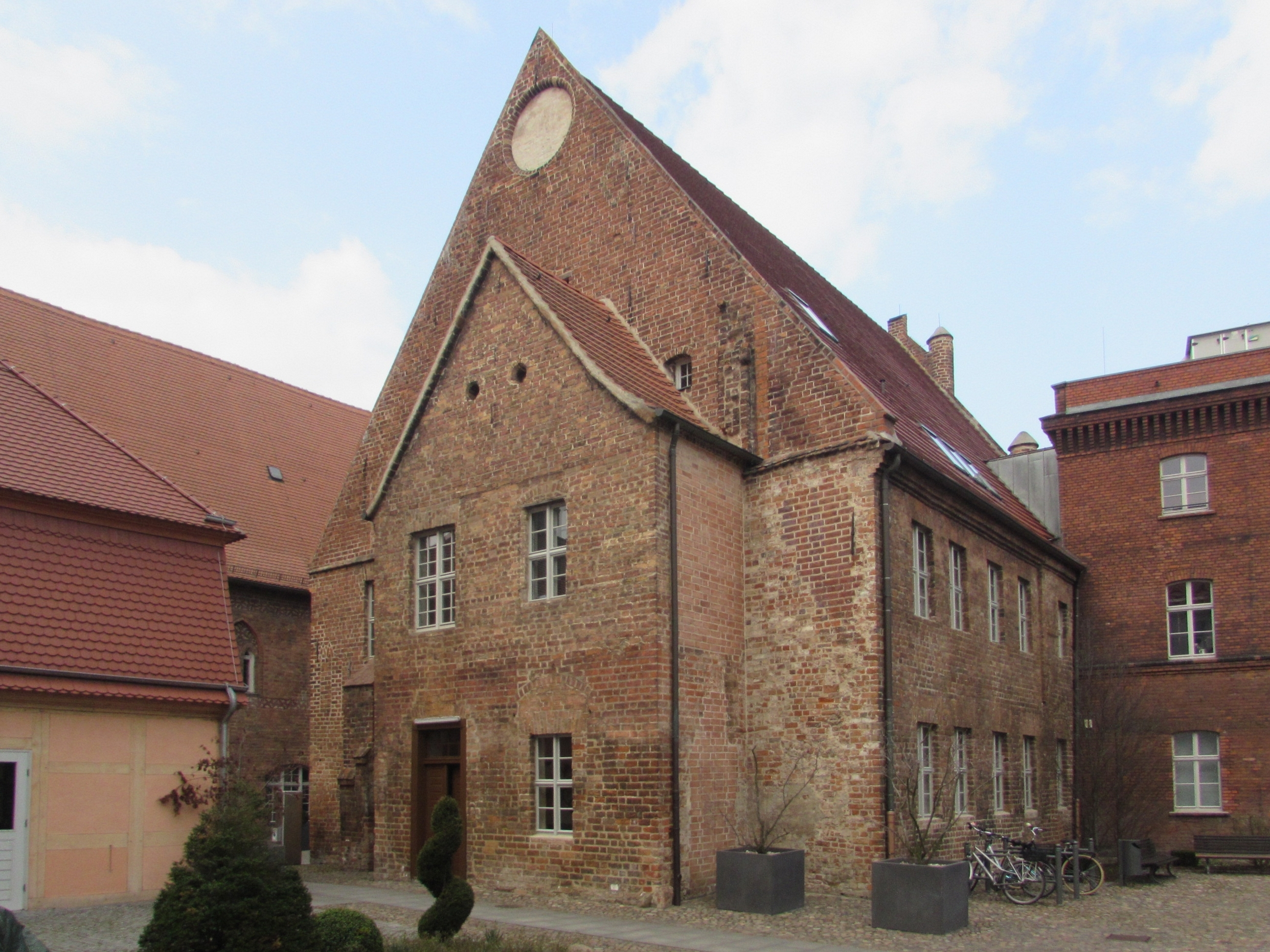 ordonnanzhaus rückseite, brandenburg altstädtischer markt